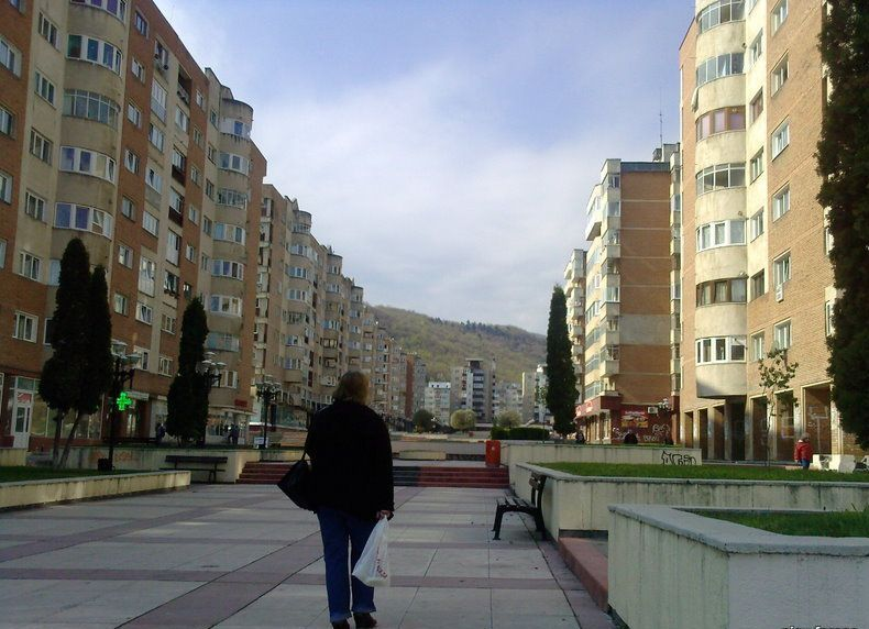 Quartier Valea Cetăţii, Braşov, Roumanie